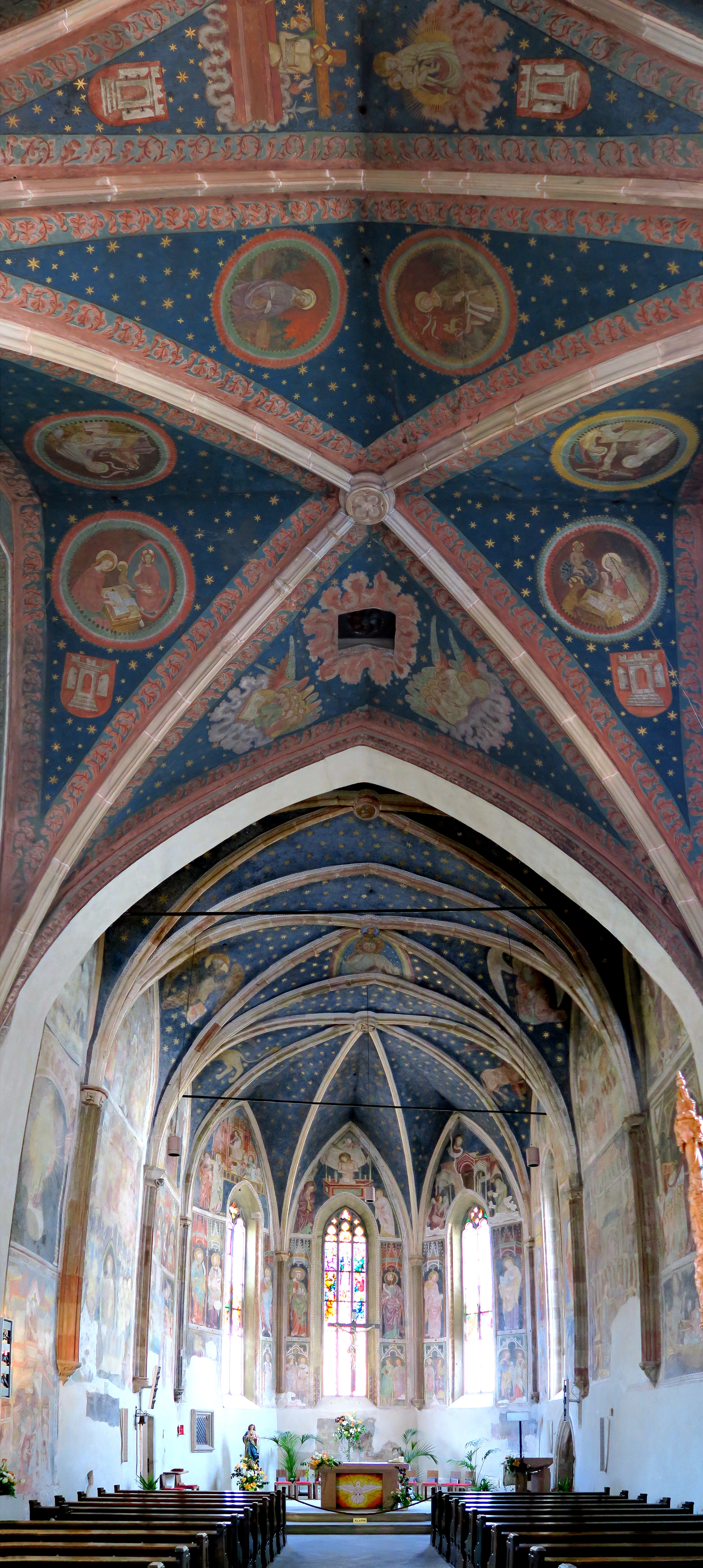 Italien, Südtirol, Terlan, Pfarrkirche Maria Himmelfahrt, Altarraum mit Deckenfresko